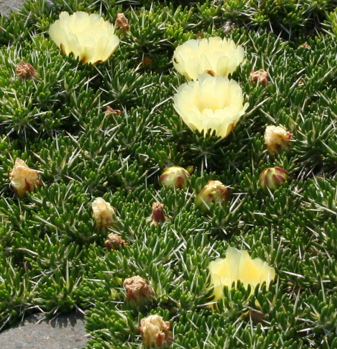 Maihuenia_poeppigii im Botanischen Garten Dresden